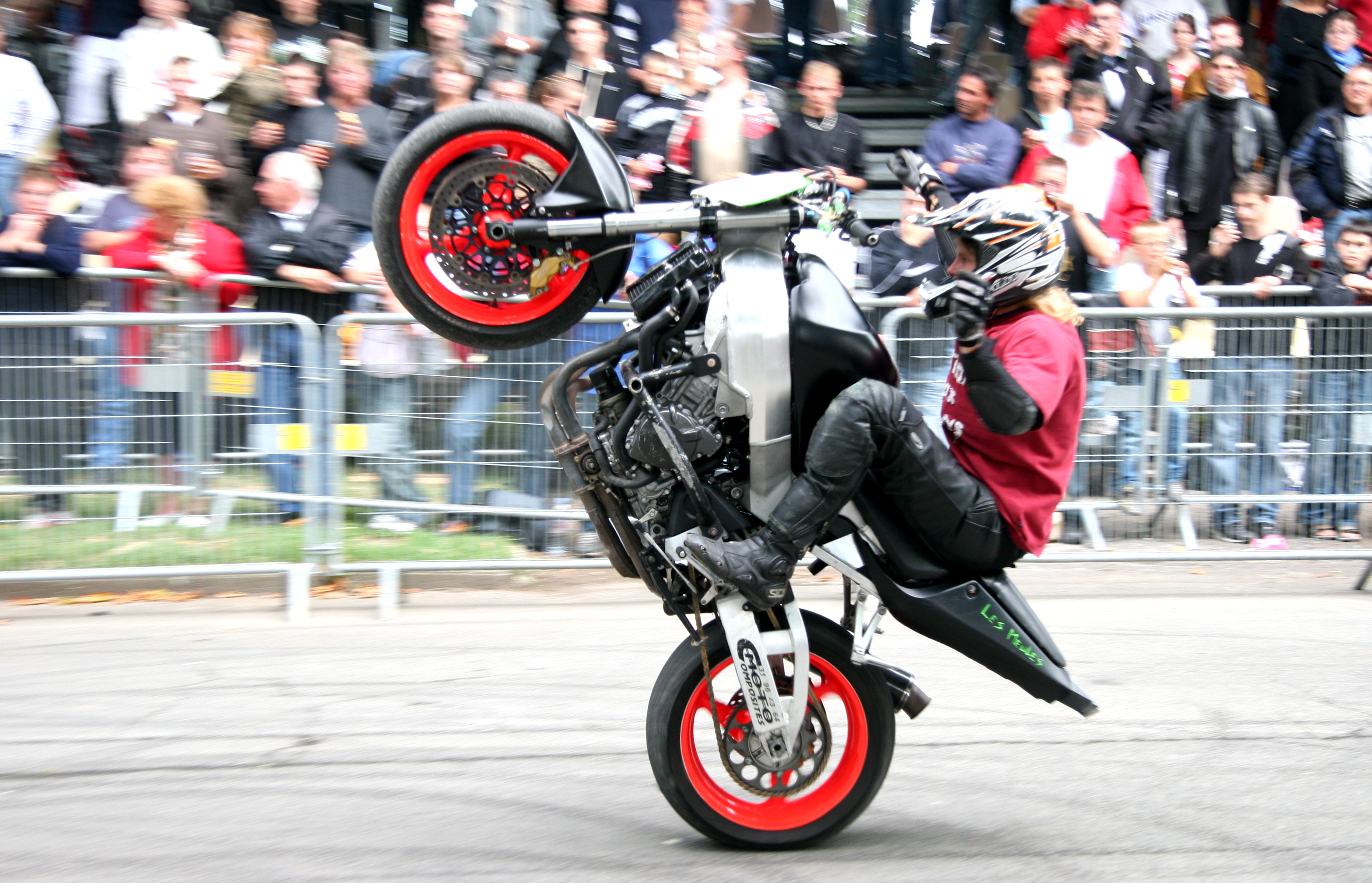 Wheeling, no hands